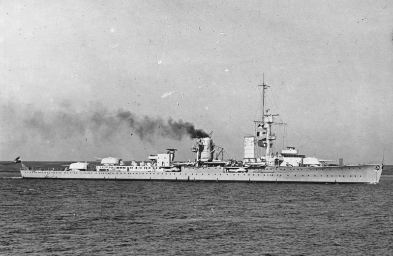 Weltreise des deutschen Kreuzers "Karlsruhe"! Der deutsche Kreuzer "Karlsruhe" passiert auf seiner Weltreise den Kaiser-Wilhelm-Kanal